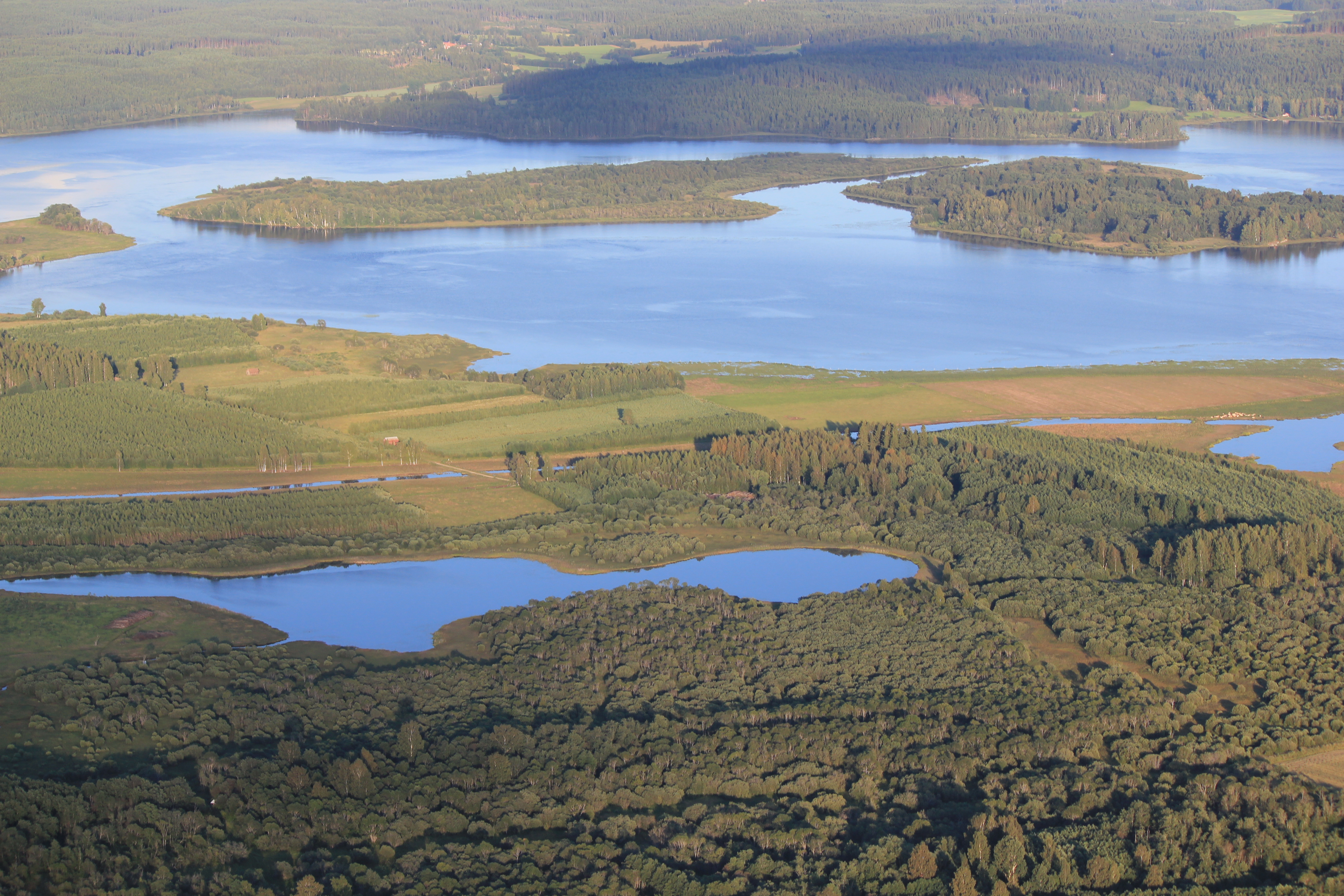 Sjöarna Hällagölen och Hovran med öarna Stackharen och Brunnaön, Hedemora kommun, Dalarnas län, Sverige This aerial photograph has been approved for publishing by the Swedish Armed Forces with the ID: FMTM 10 830:11043 This tag does not indicate the copyright status of the attached work. A normal copyright tag is still required. See Commons:Licensing for more information.